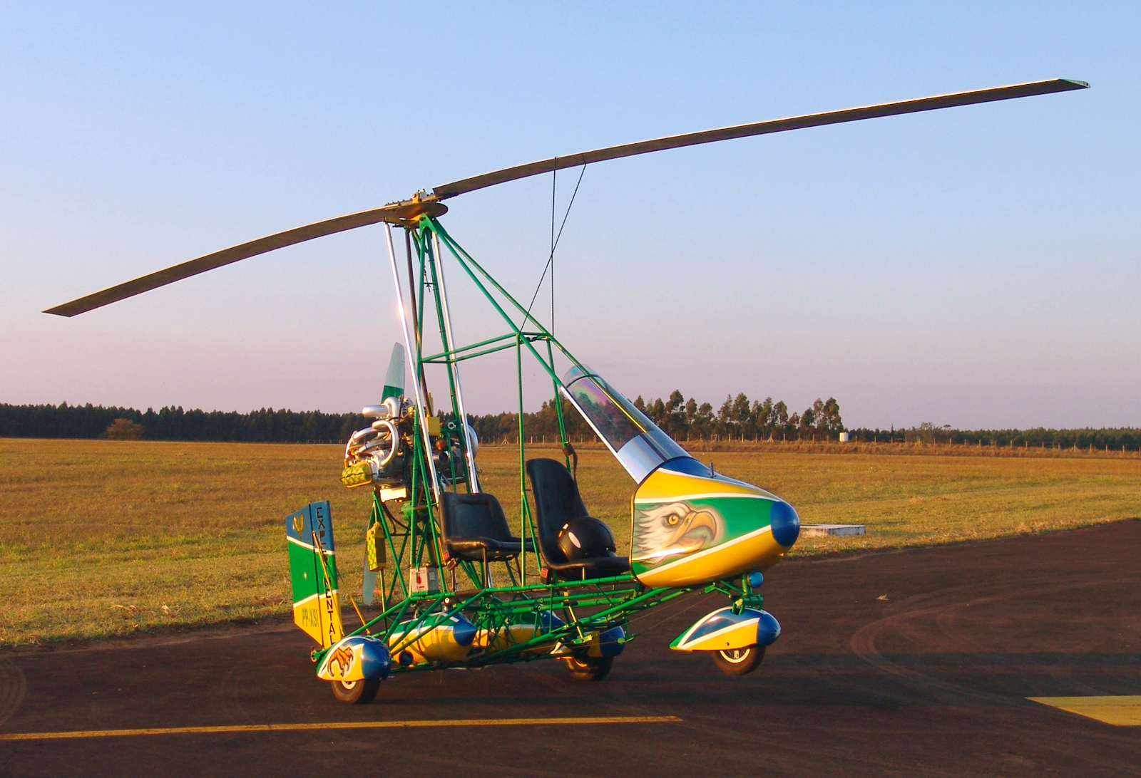 Girocóptero - Aeroporto de Avaré - SP - Brasil